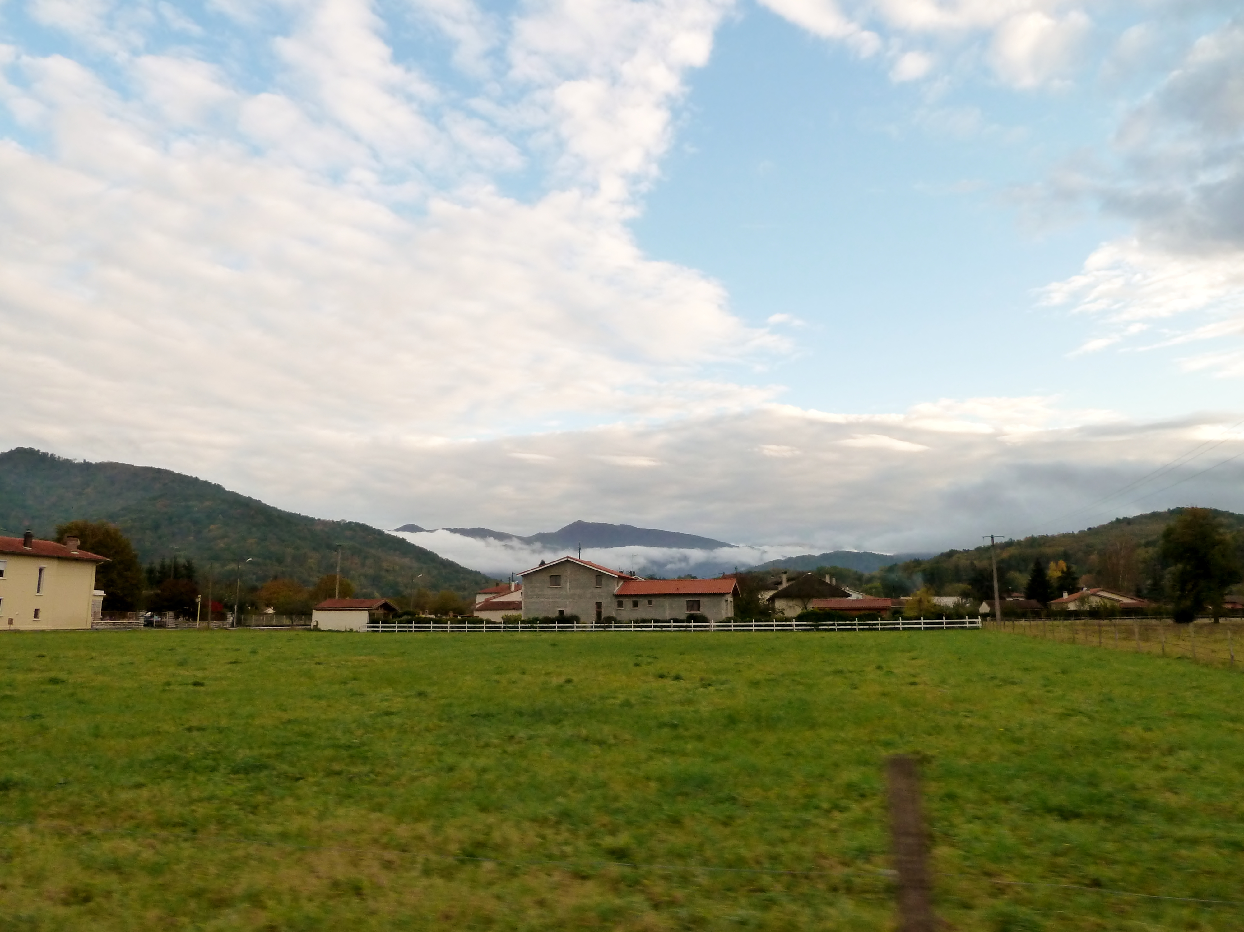 Soueich